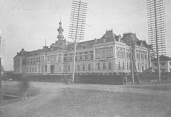 東京府庁 有楽町 明治時代